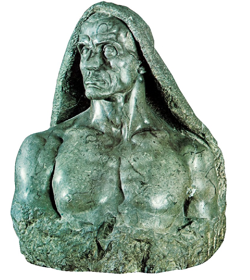 “Cargador de Bilbao”, Quintín de Torrerena. Irudi honek portuko langile bat azaltzen du, aurpegiaren keinuetan eta soinaren planoetan indar handia adierazten duena.